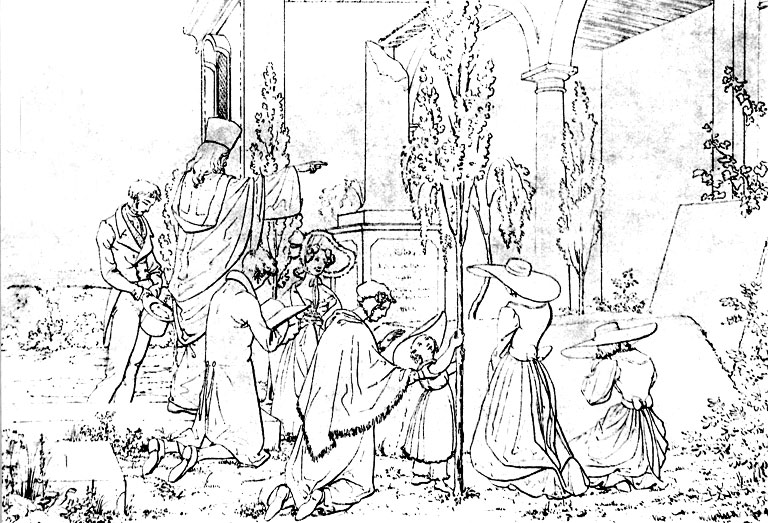 Похороны А.А. Воейковой (1795-1829) на кладбище в Ливорно.